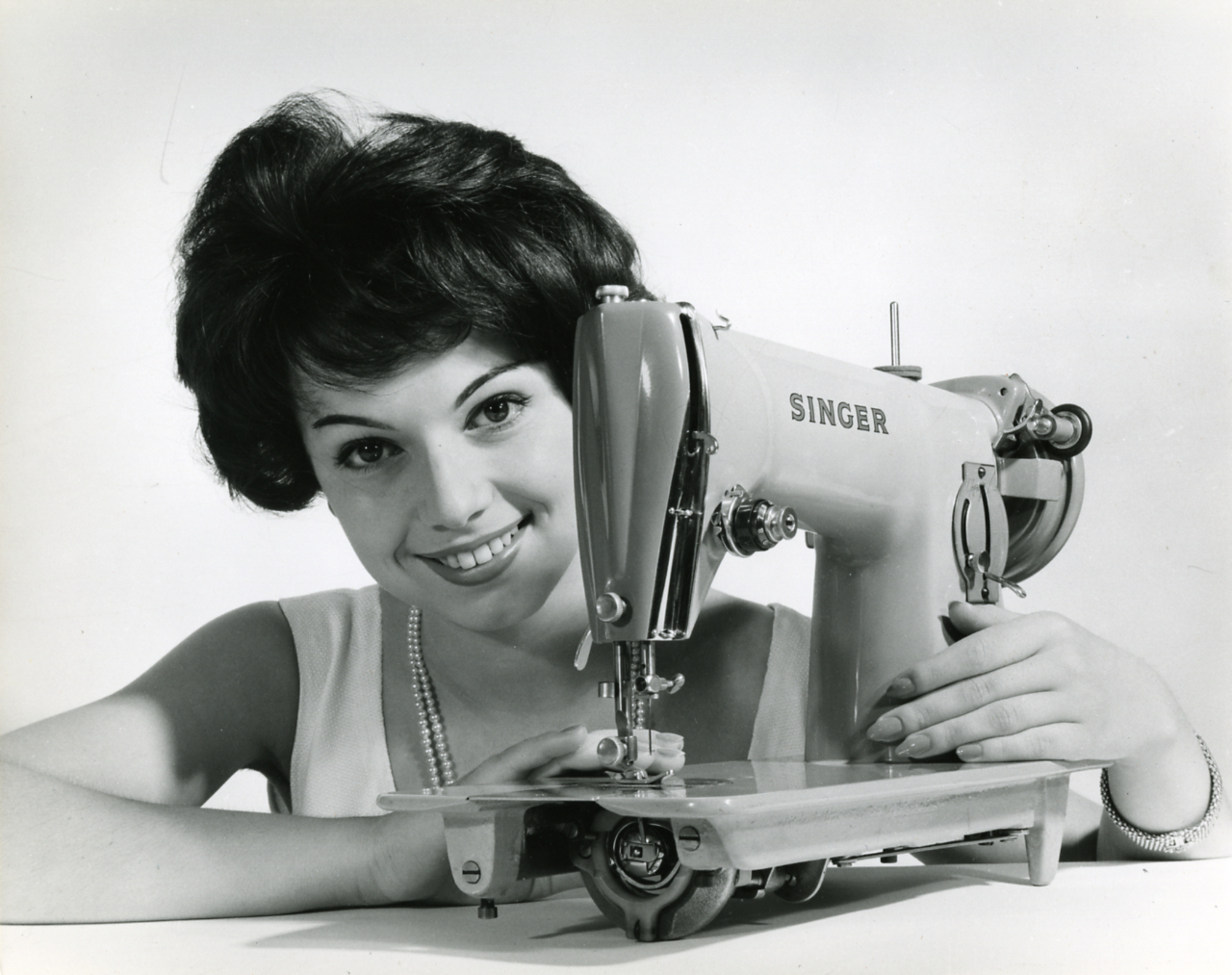 Macchina da cucire Singer. Pubblicità con modella. Servizio fotografico : Milano, 1963 / Paolo Monti. - Stampe: 5 : Positivo b/n, gelatina bromuro d'argento/ carta, 24x30. - ((Al verso delle stampe timbro a inchiostro con copyright (Via Colonna - Milano). - Sul coperchio della scatola iscrizione didascalica manoscritta a pennarello nero: "8 Brescia". - Fonte: Rubrica di Paolo Monti: Archivio 10x12 (ultimi numerati) - dal G1 al (s.d.), presso Archivio Paolo Monti